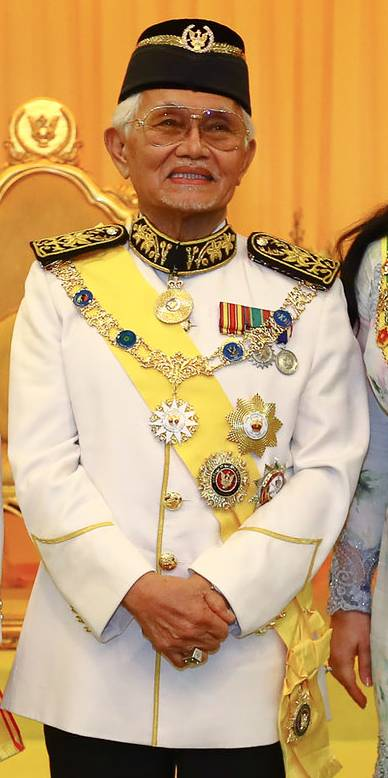 Tun Pehin Sri Abdul Taib Mahmud